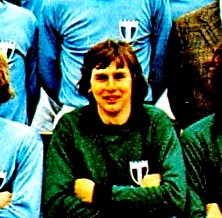 Freddie Forsland 1973